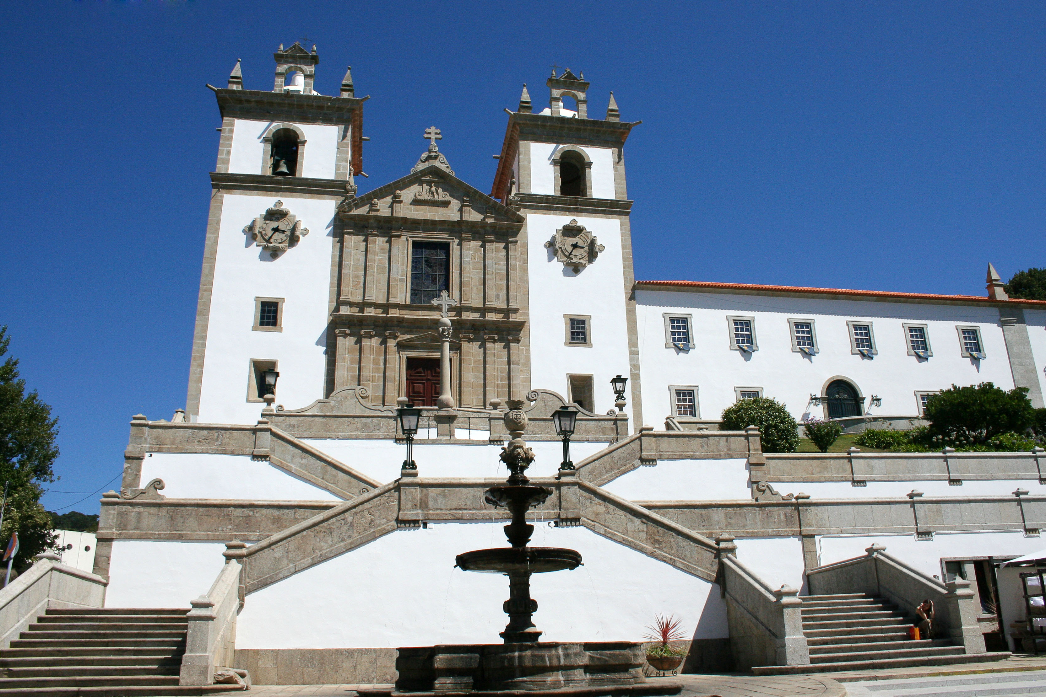 Igreja Matriz de Santa Maria da Feira Templo do século XVI de planta em cruz latina, de uma só nave e claustro de dois pisos. De estilo maneirista, domina, conjuntamente com o Convento dos Lóios, a praça principal da cidade.